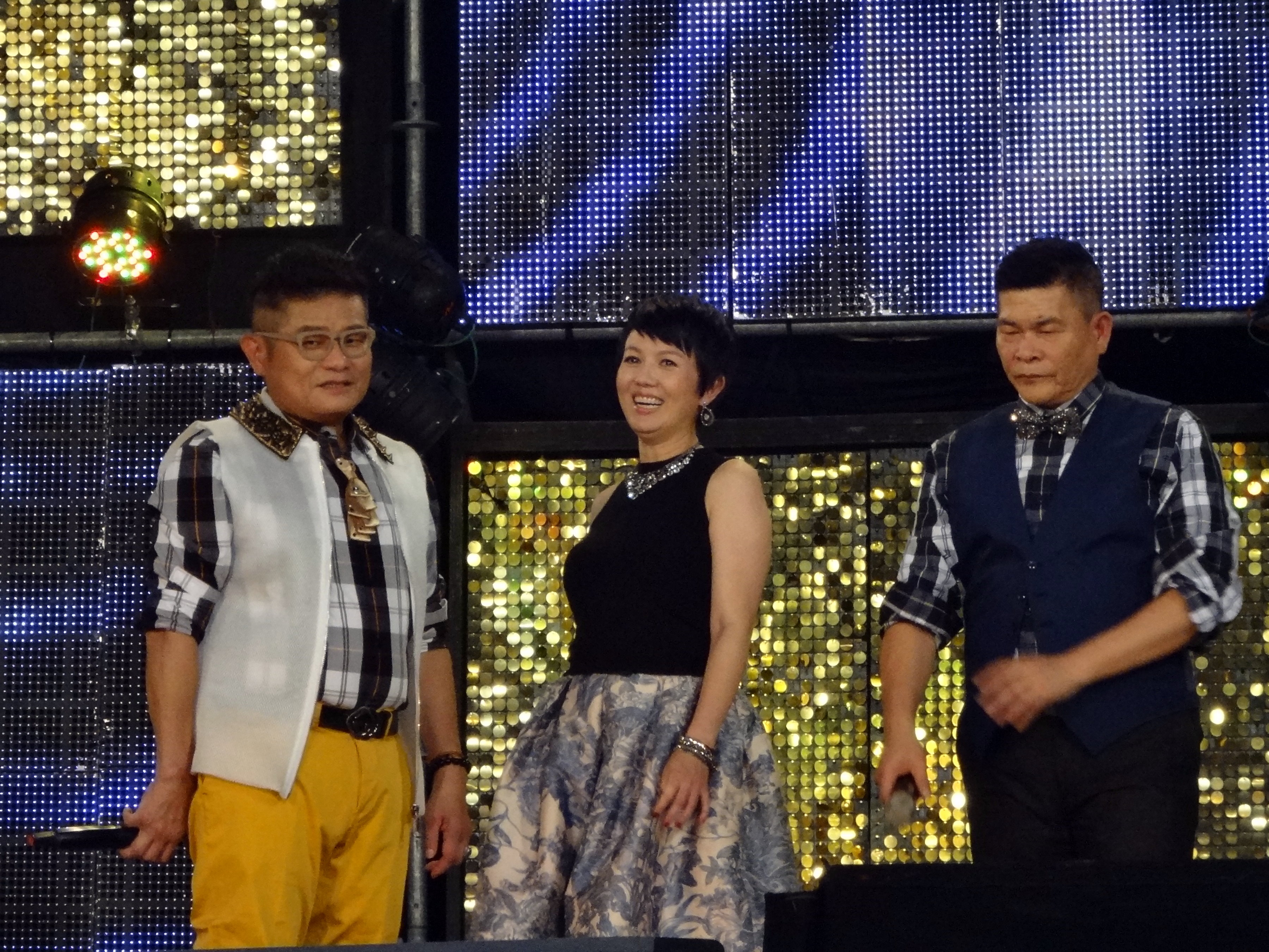 三立台灣台綜藝節目《超級夜總會》於基隆市七堵區堵南國民小學操場錄影，開始錄影前，主持人許效舜（左）、苗可麗（中）、澎恰恰（右）就定位。